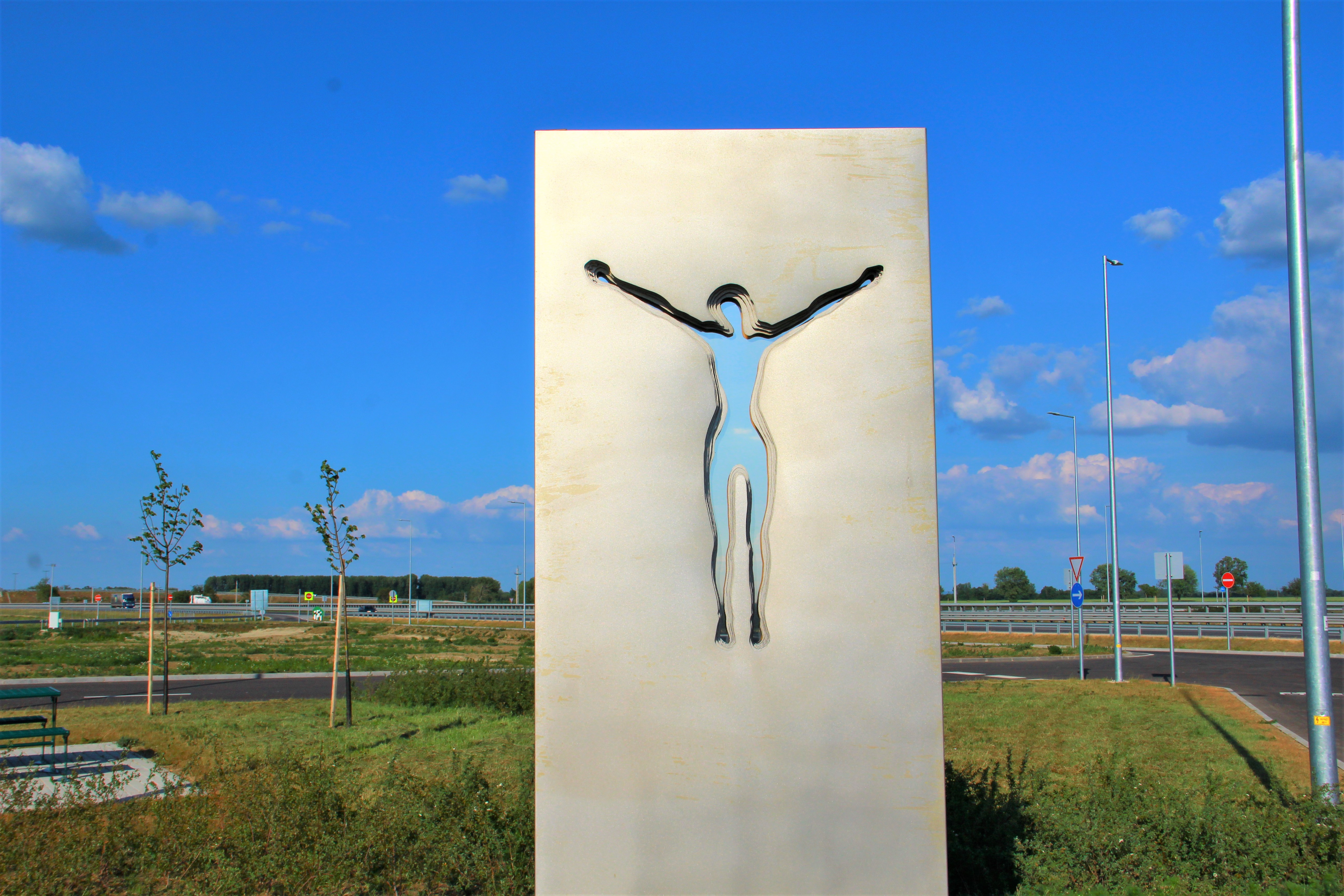 Pléh Krisztus a Rábaköz pihenőhelyen